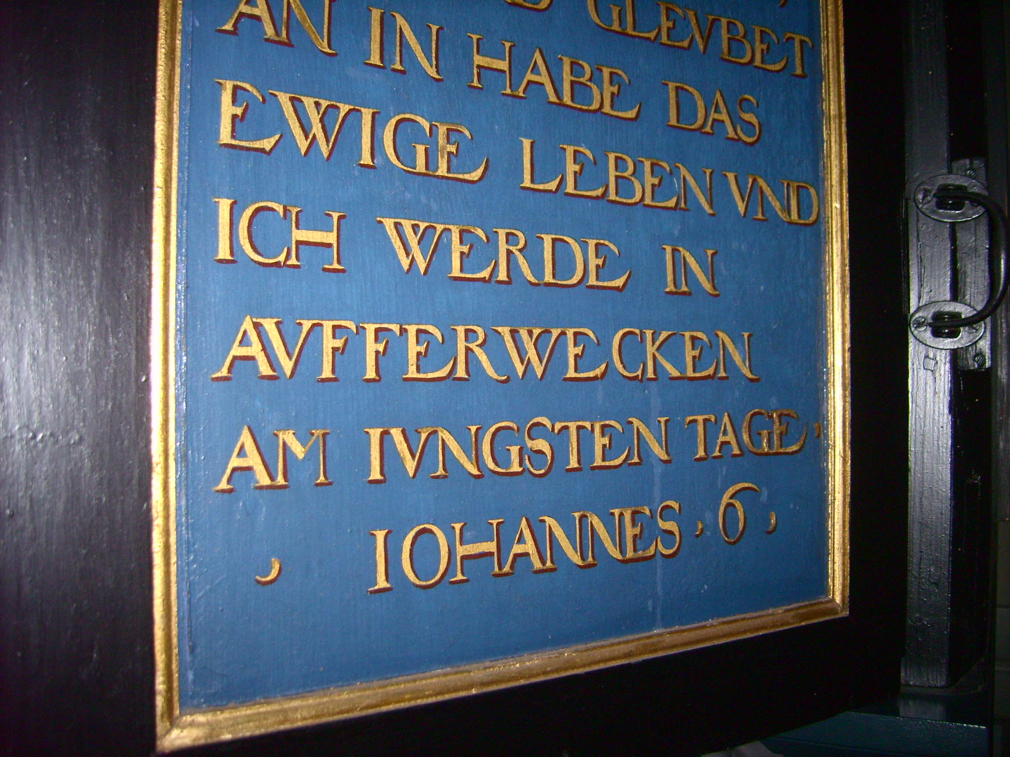 Inschrift der Außenseite des rechten Altarflügels in der St.-Urban-Kirche Klein Ilsede